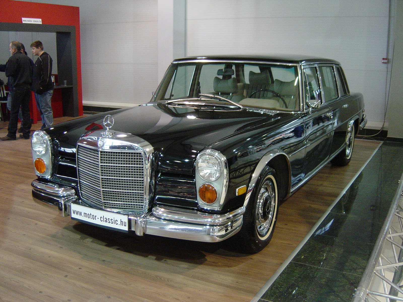 Mercedes